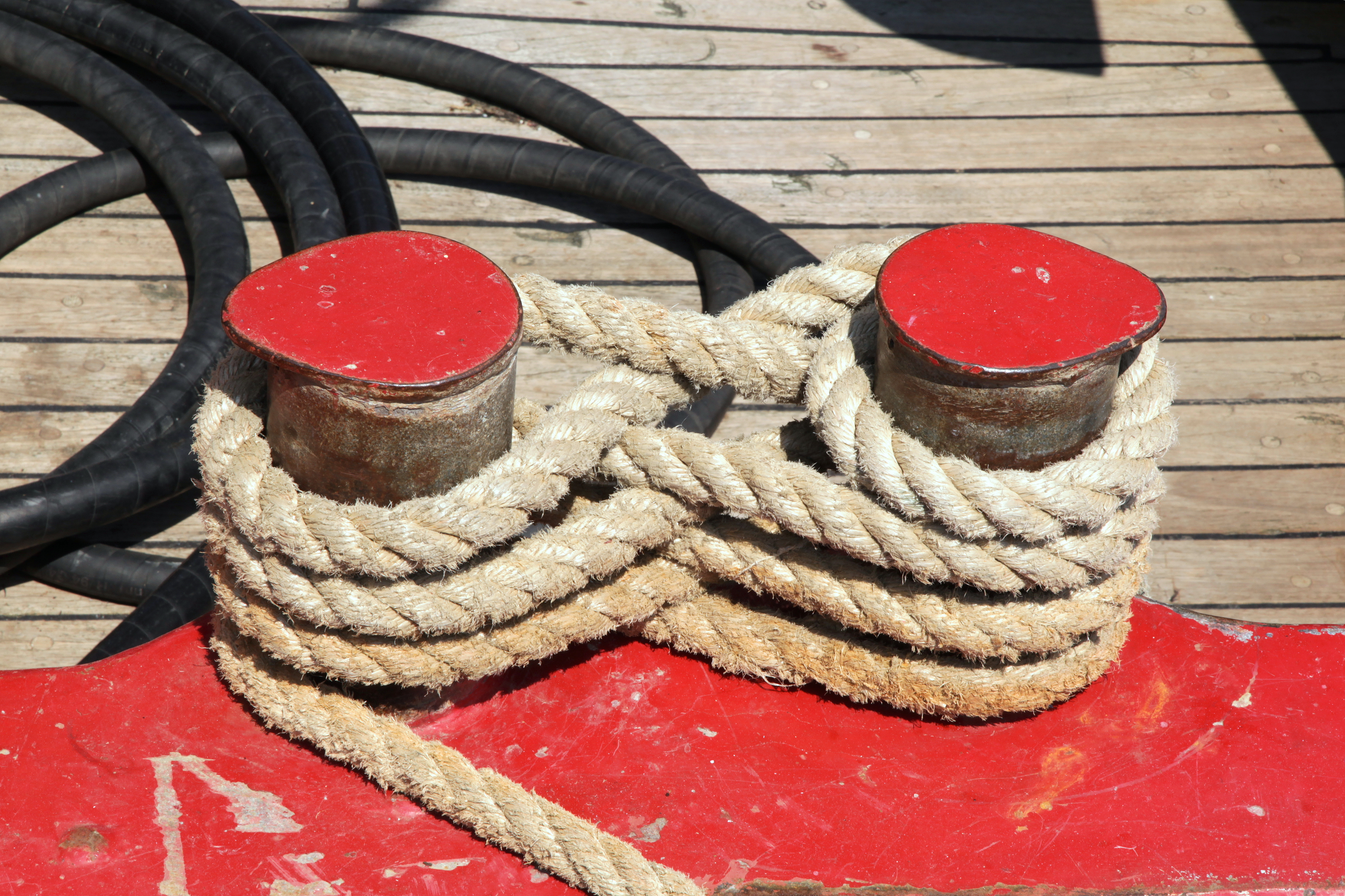 Schwalbe (ECKE 15) im Außenhafen an der Schiffbrücke in Eckernförde